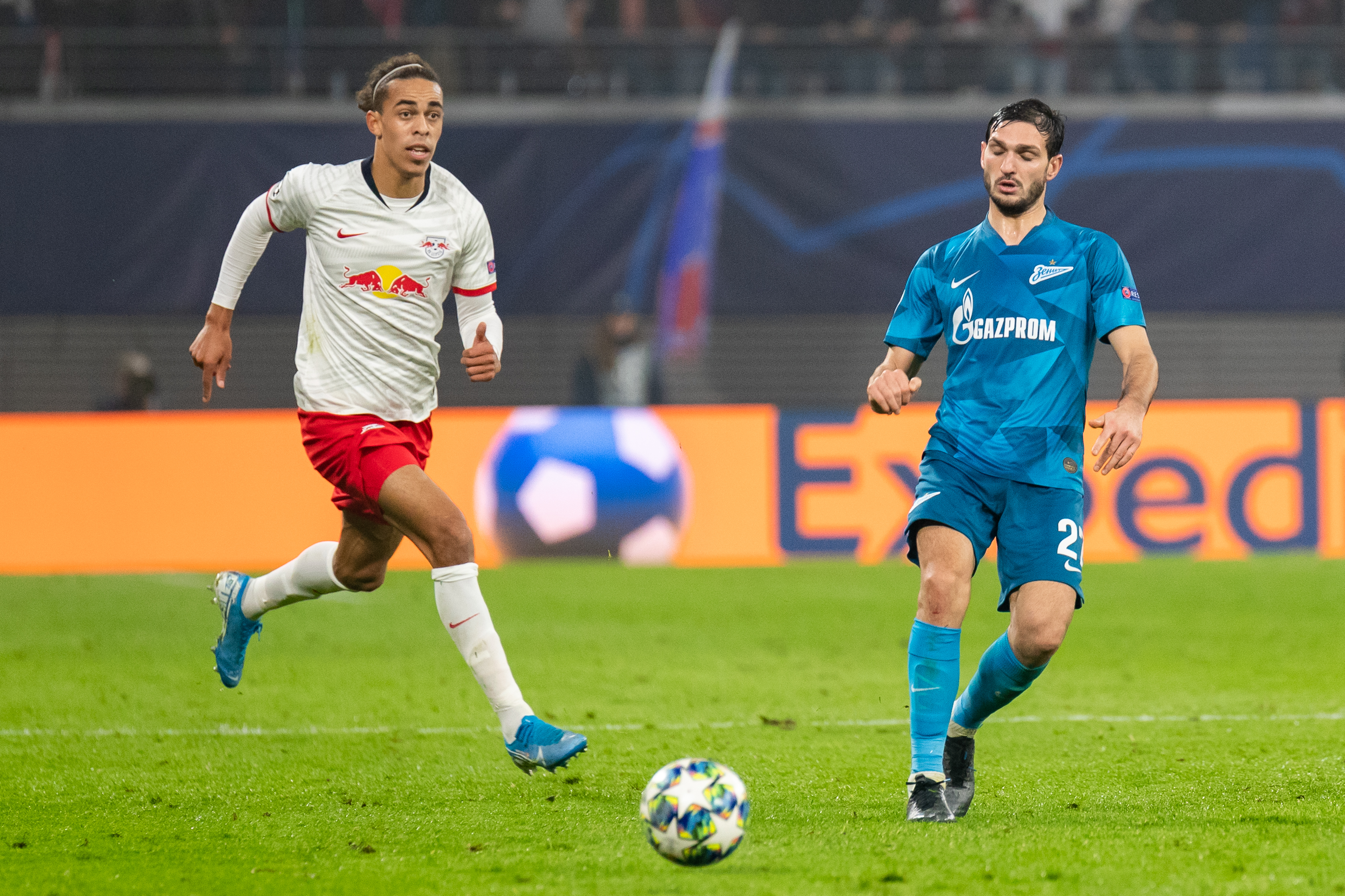 Fußball, Männer, UEFA Champions League, RB Leipzig - FC Zenit St. Petersburg; v.li.: Yussuf Poulsen (RB Leipzig, 9), Magomed Osdojew (Магомед Оздоев, Zenit St. Petersburg, 27); Laufduell